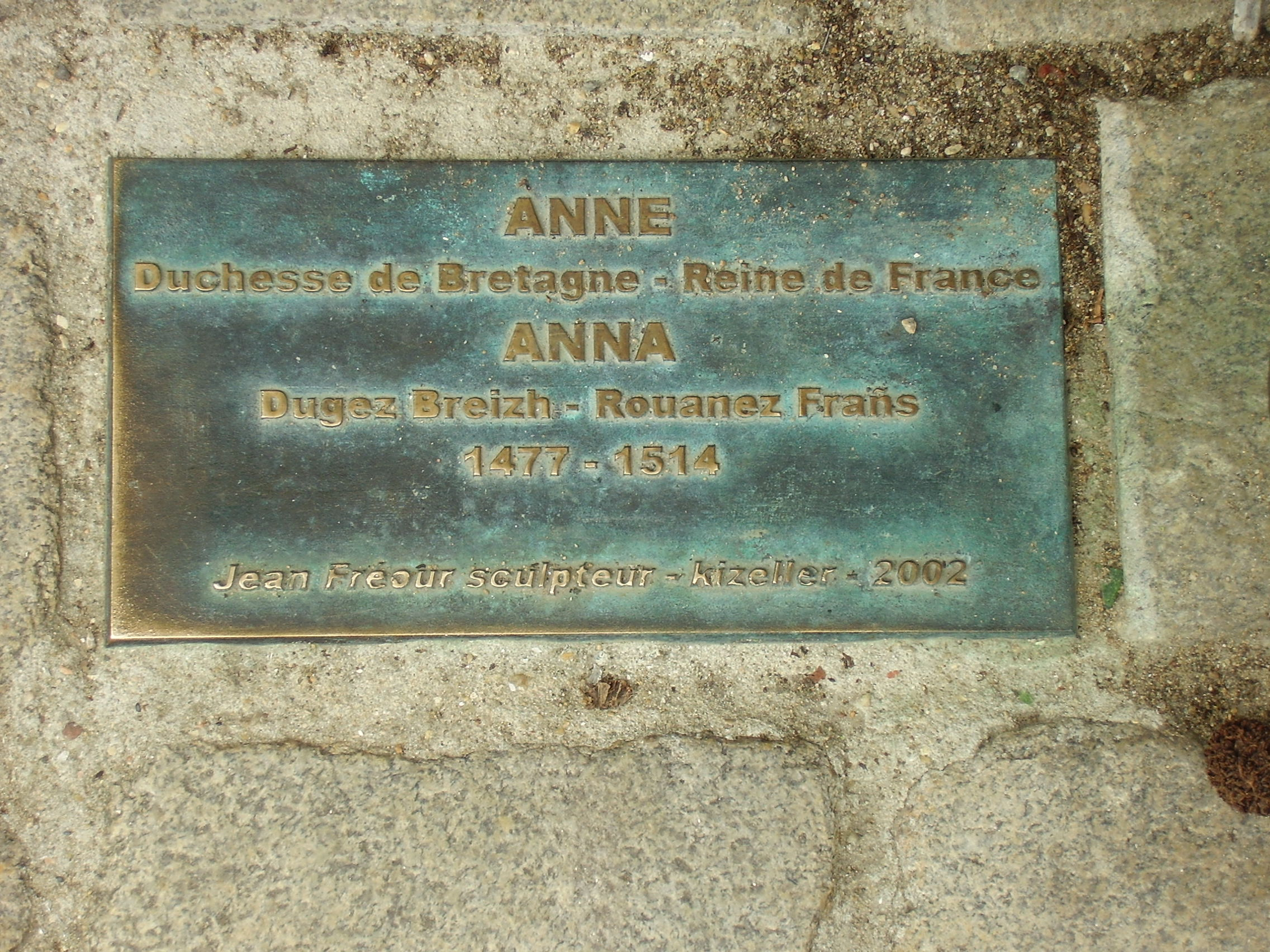 Nantes, France